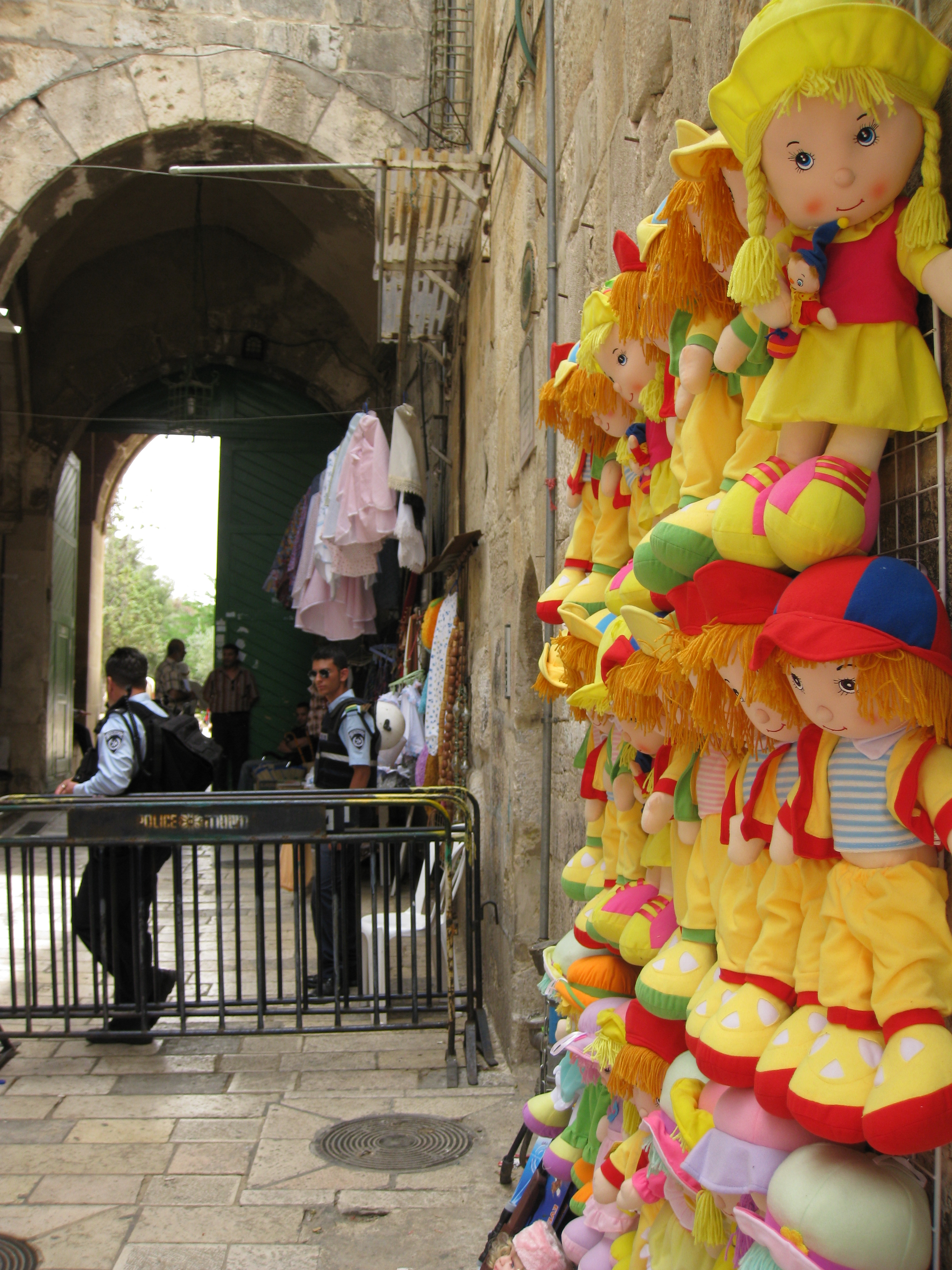 Muslim Quarter - Gate of the Inspector הרובע המוסלמי בירושלים שער המשגיח